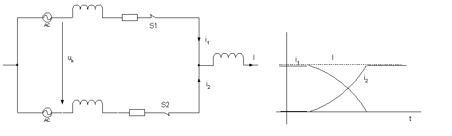 Prinzip Kommutierung